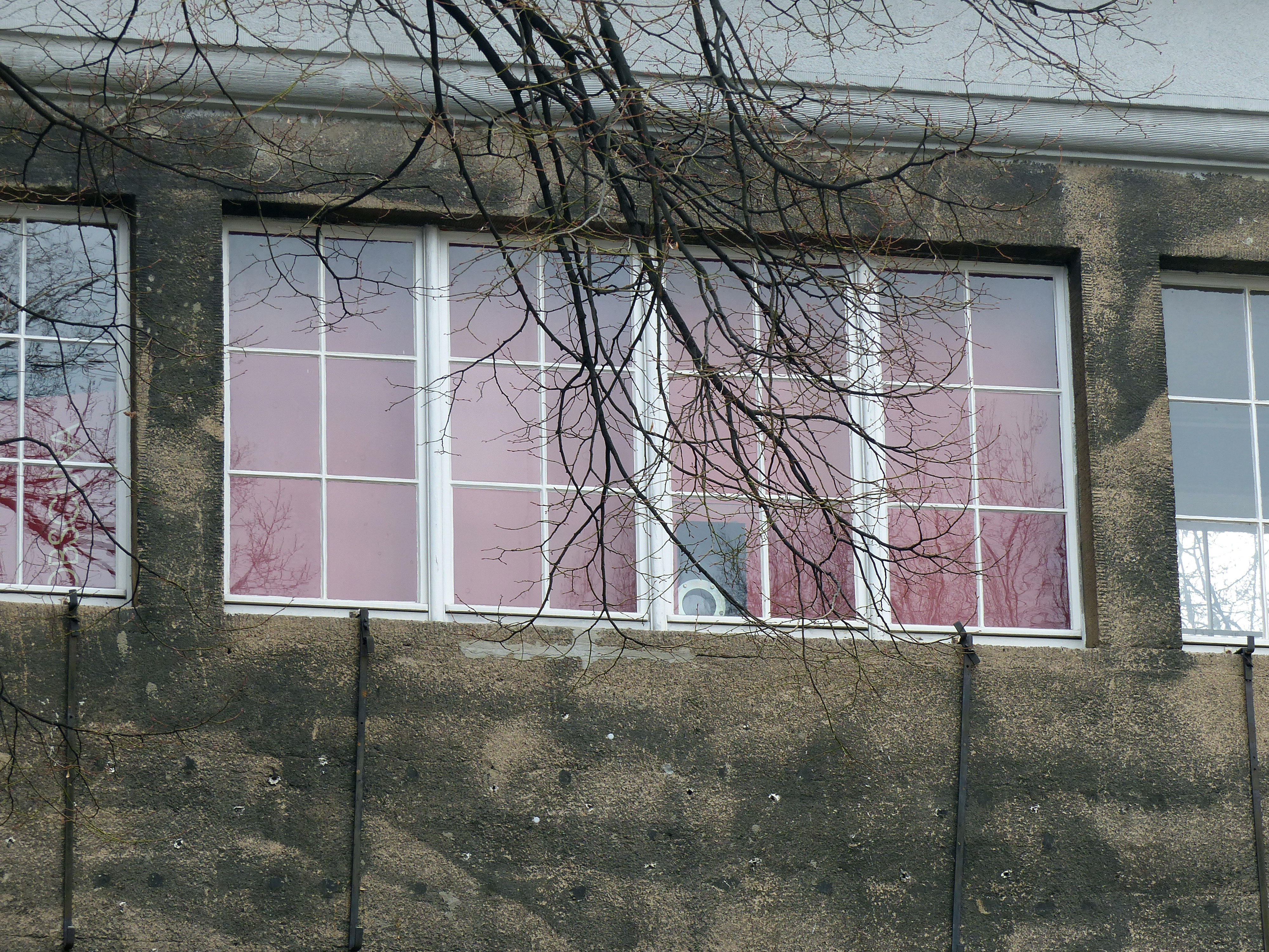 Camera obscura im Straßenübergang zwischen den Gebäudeteilen der ehem. Ernemann-Werke in Dresden, heute Technische Sammlungen Dresden